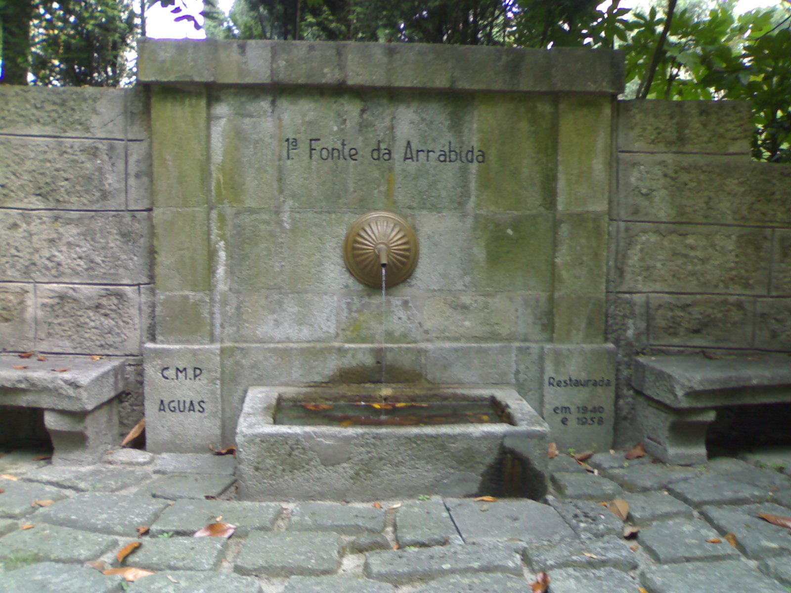 Construída por ordem da Companhia Geral da Agricultura das Vinhas do Alto Douro, no sopé do monte do mesmo nome, para aproveitamento de um fia de água cristalina, fresca e muito pura que brotou espontaneamente da rocha aquando da construção do cais que vai de Massarelos à Arrábida. Localizada perto da Fundição Arrábida esta primeira fonte foi subtituída por uma segunda e transferida para os jardins do SMAS em 1948.